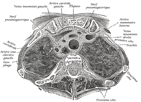 Représentation artistique d'une coupe du médiastin sur la seconde vertèbre thoracique. Traduit du en: par Raziel